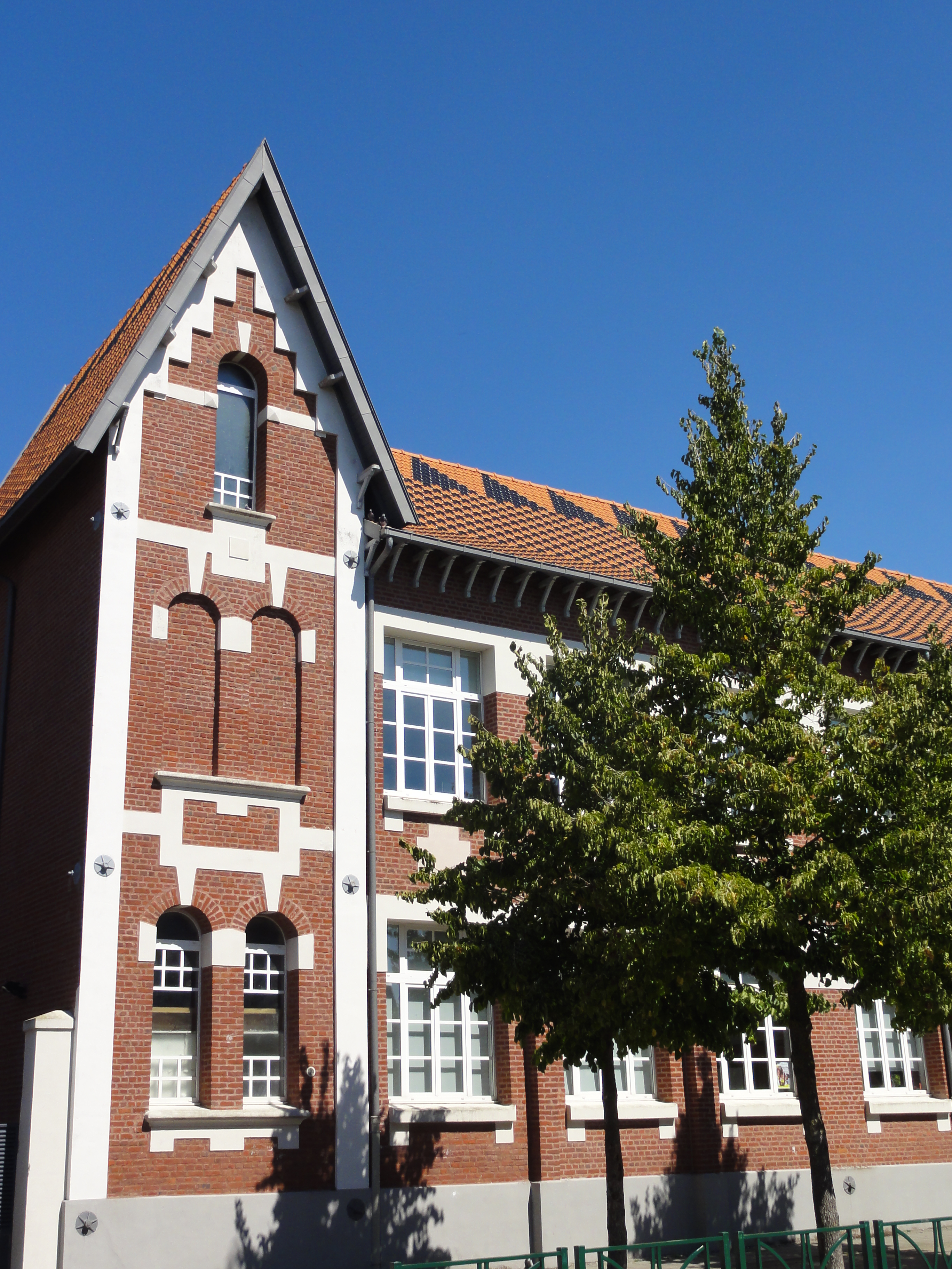 Écoles des cités de la fosse n° 4 - 4 bis - 4 ter de la Compagnie des mines de Bruay, Bruay-la-Buissière, Pas-de-Calais, Nord-Pas-de-Calais, France.